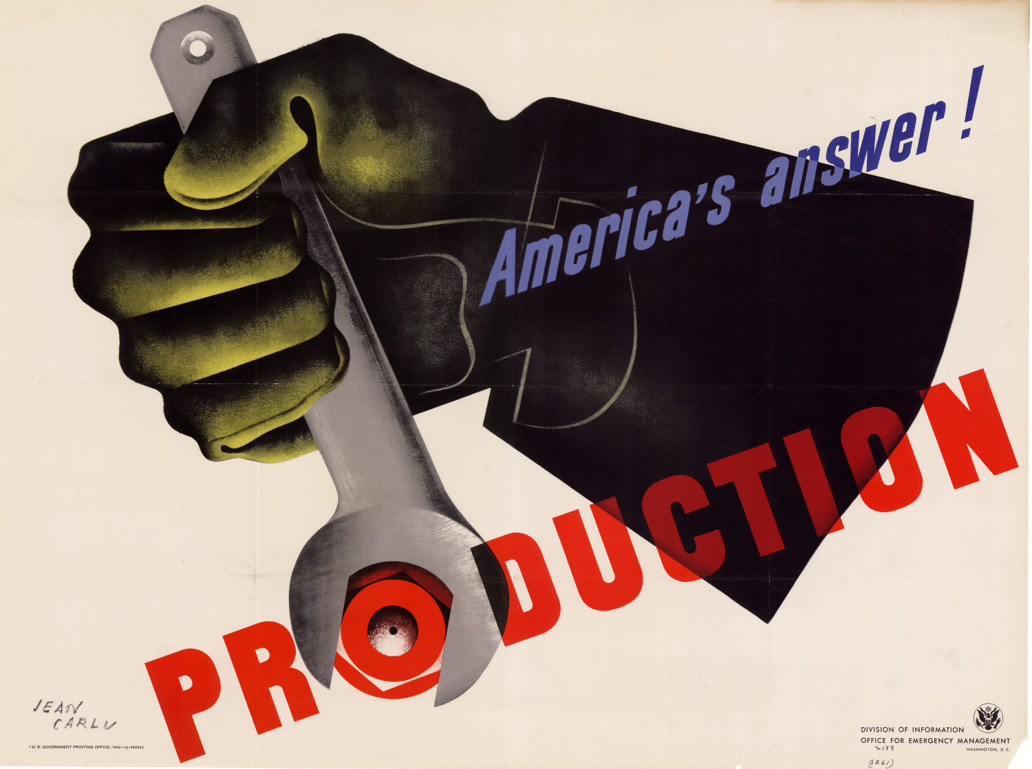 Jean Carlu WWII Propaganda poster